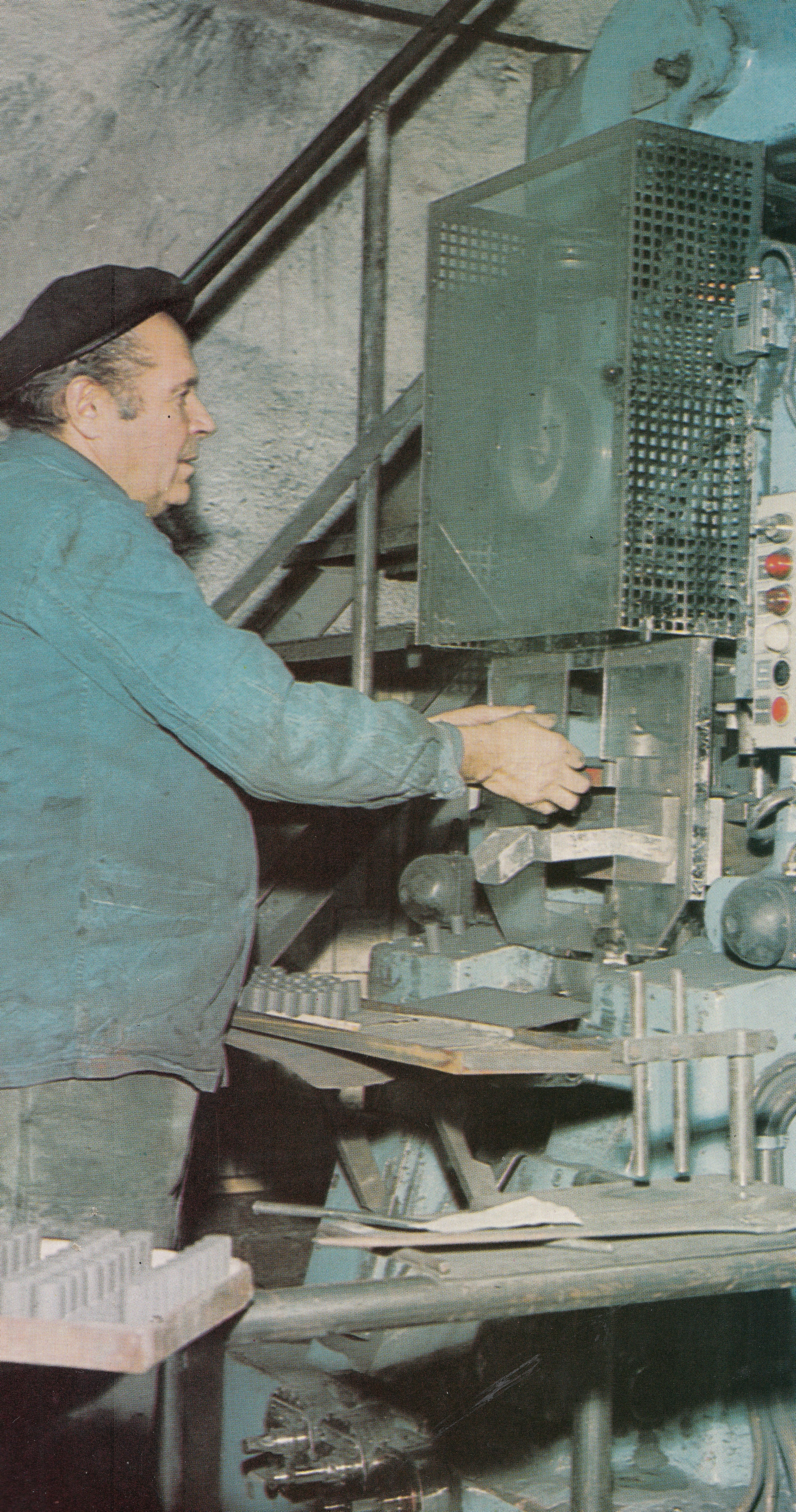 Zakłady Materiałów Magnetycznych „Polfer” w Warszawie. Obsługa prasy mechanicznej do prasowania wyrobów ferrytowych.